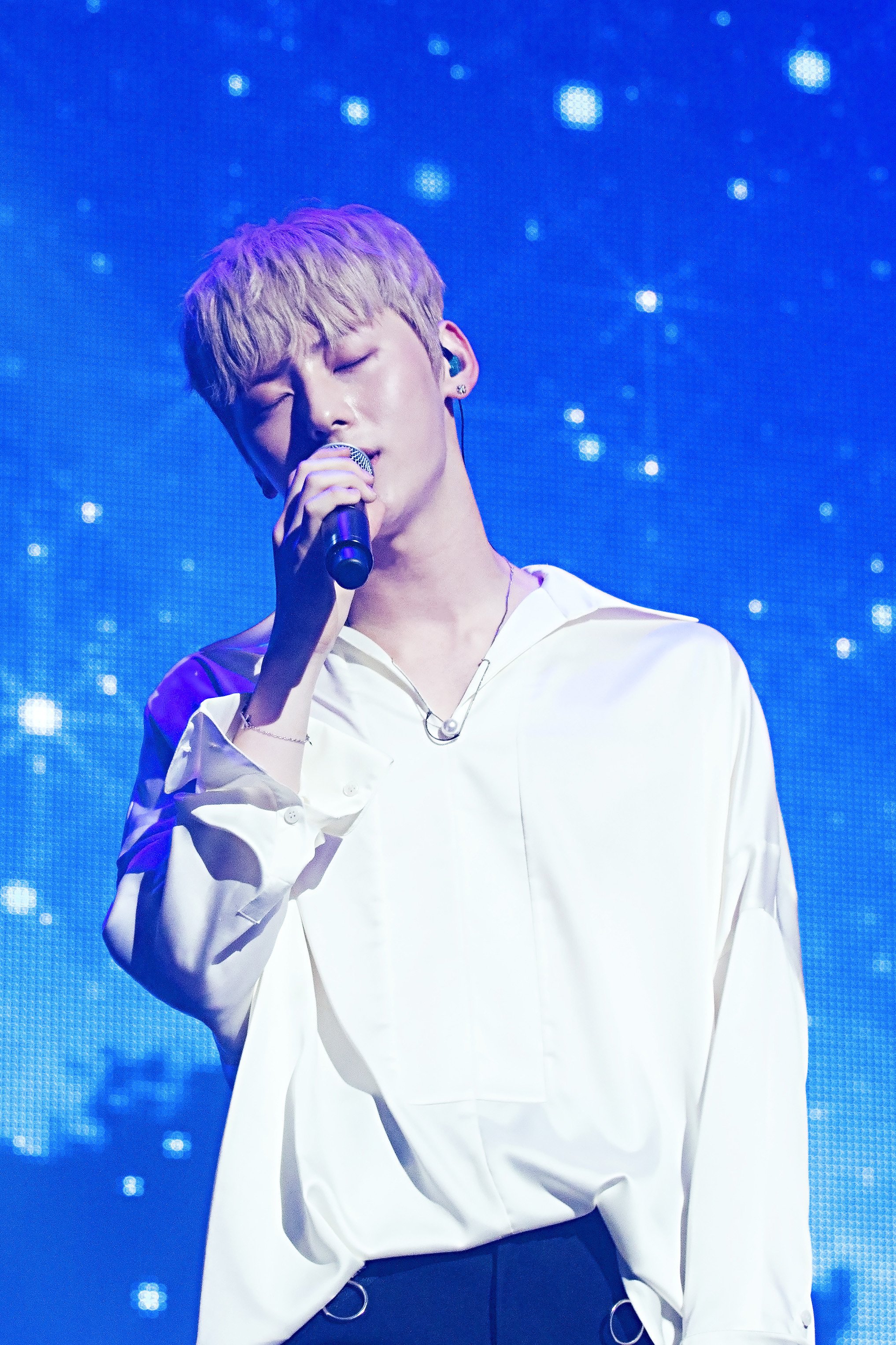 조선말: 160829 민현